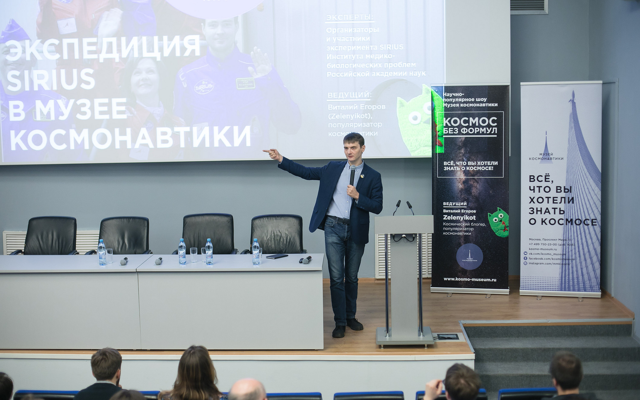 Научное ток-шоу "Космос без формул" в Музее космонавтики. Ведущий - космический блогер Виталий Егоров (Zelenyikot). Ноябрь 2017 года.